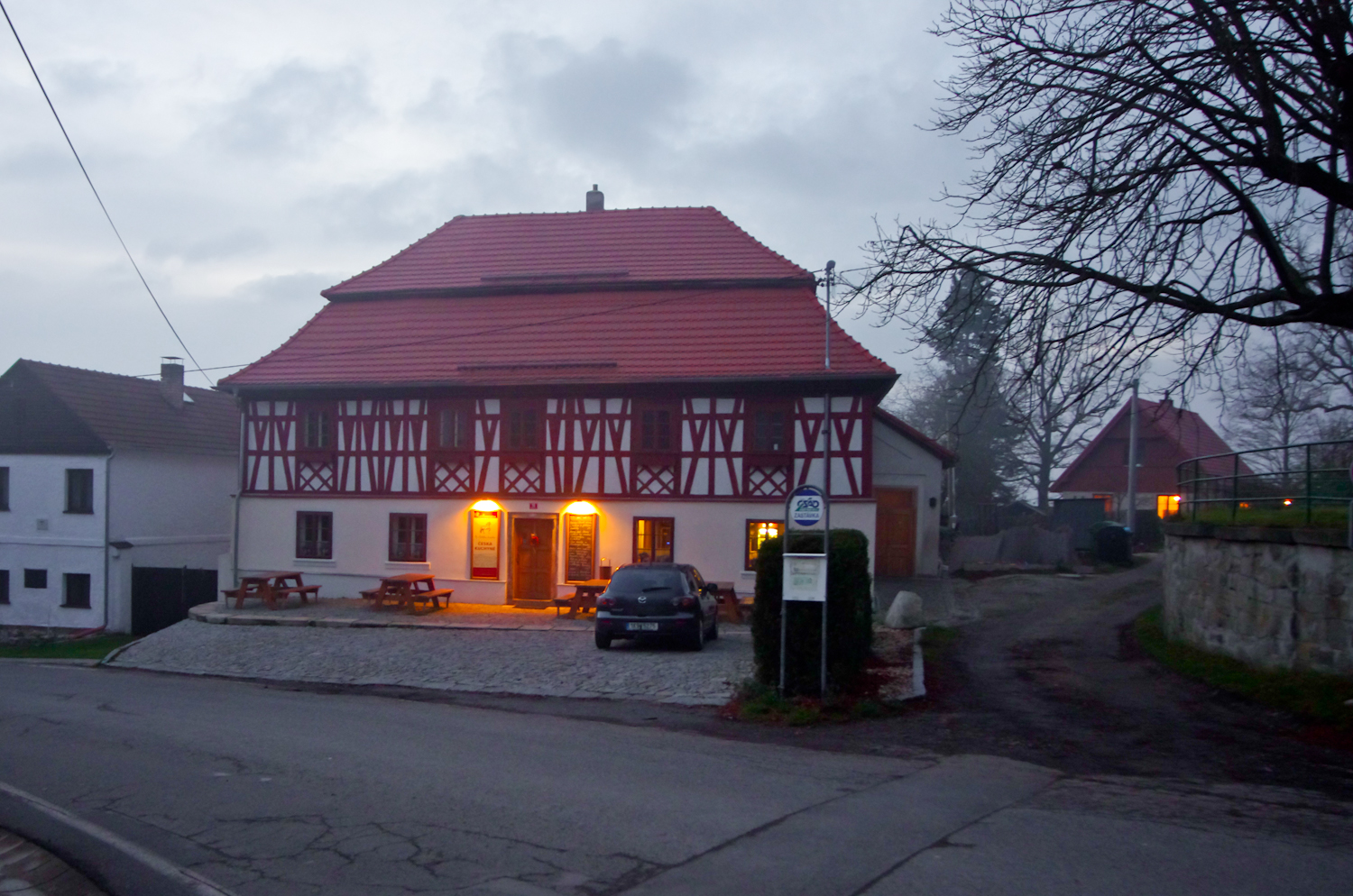 Jiná správní stavba - panský dům (Kostelní Bříza), náves 16, Kostelní Bříza